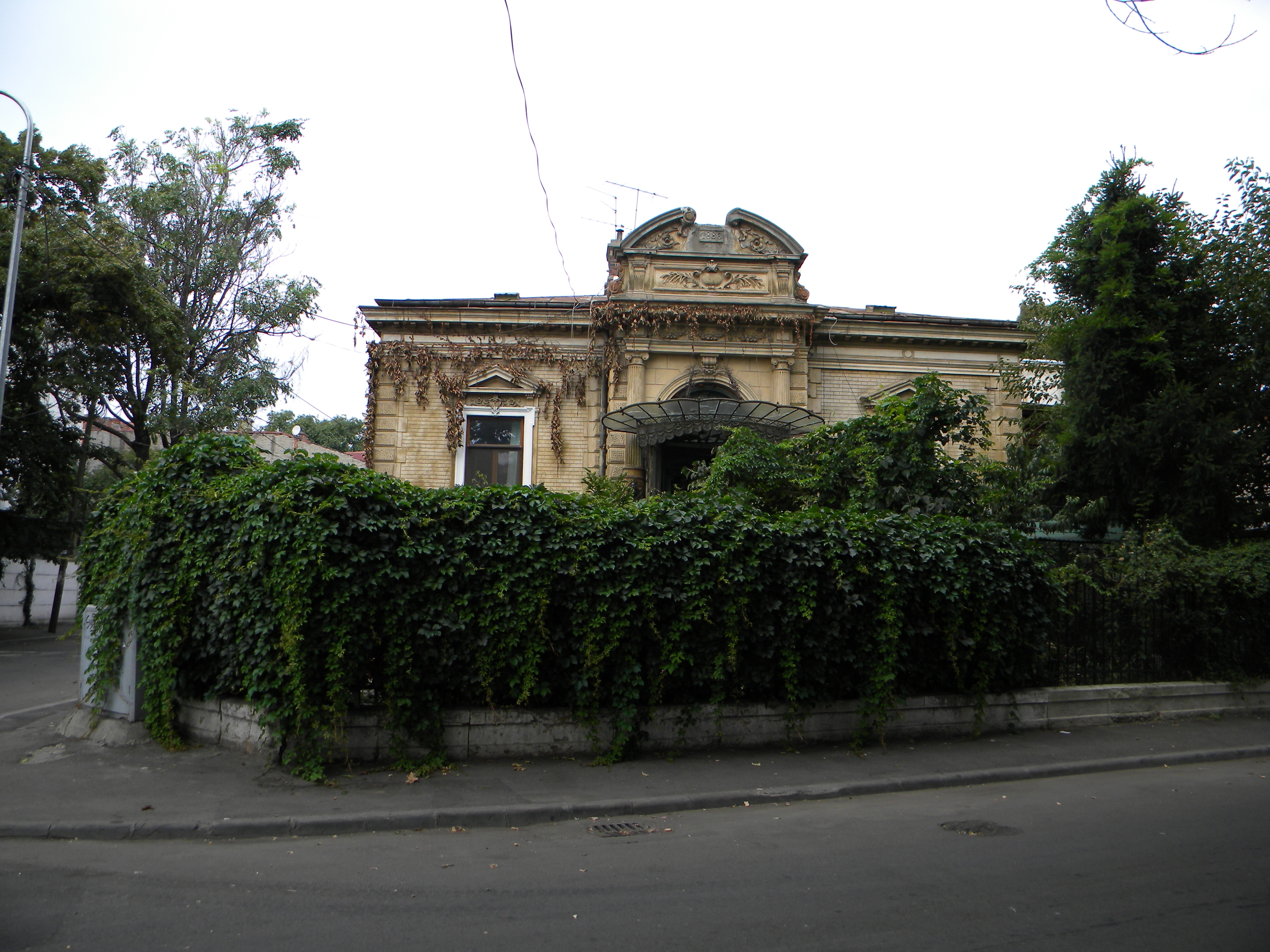 Bucuresti, Romania, Imobil pe Str. Spatarului nr. 19; B-II-m-B-19722